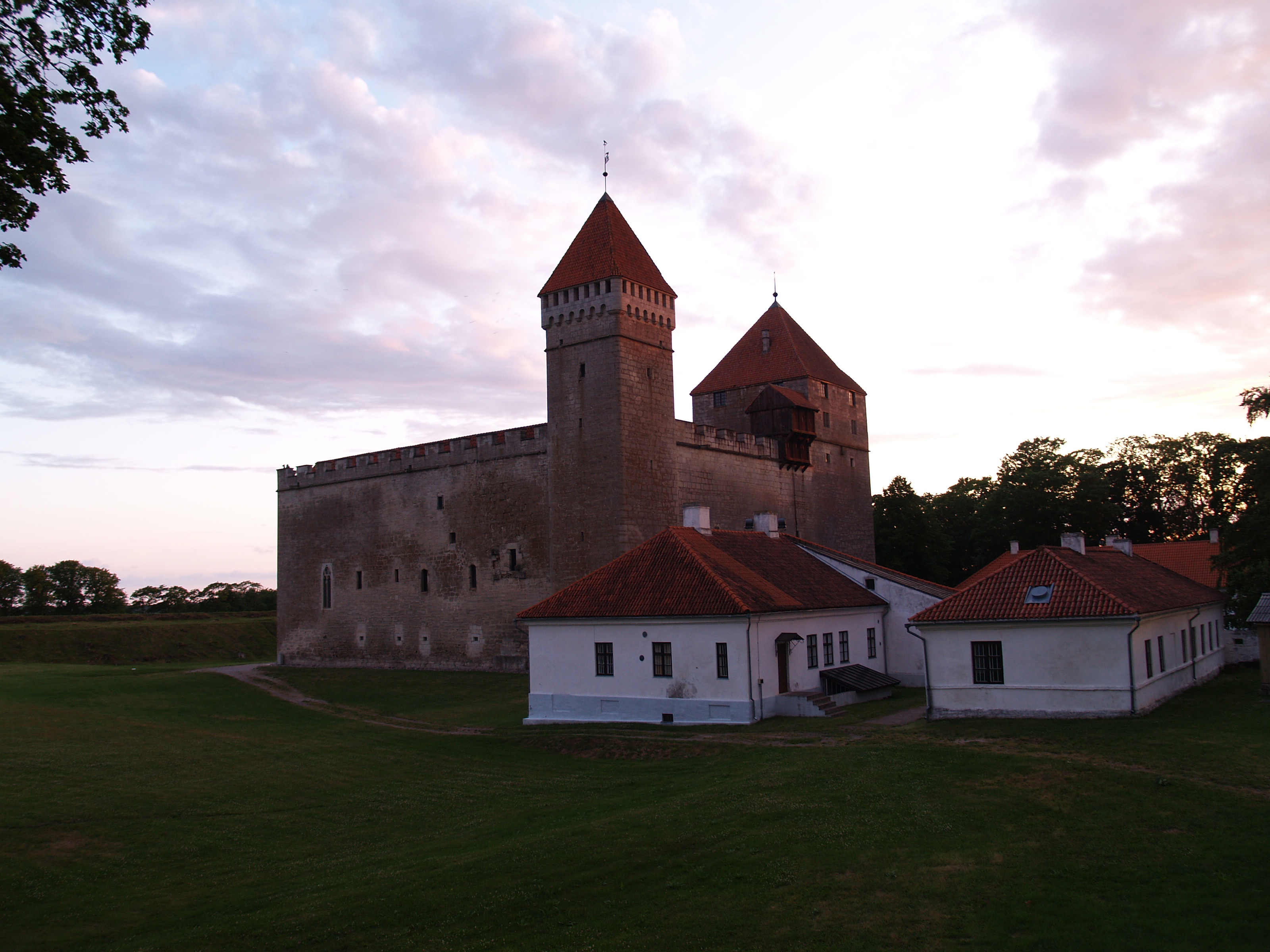 Kuressaare linnus